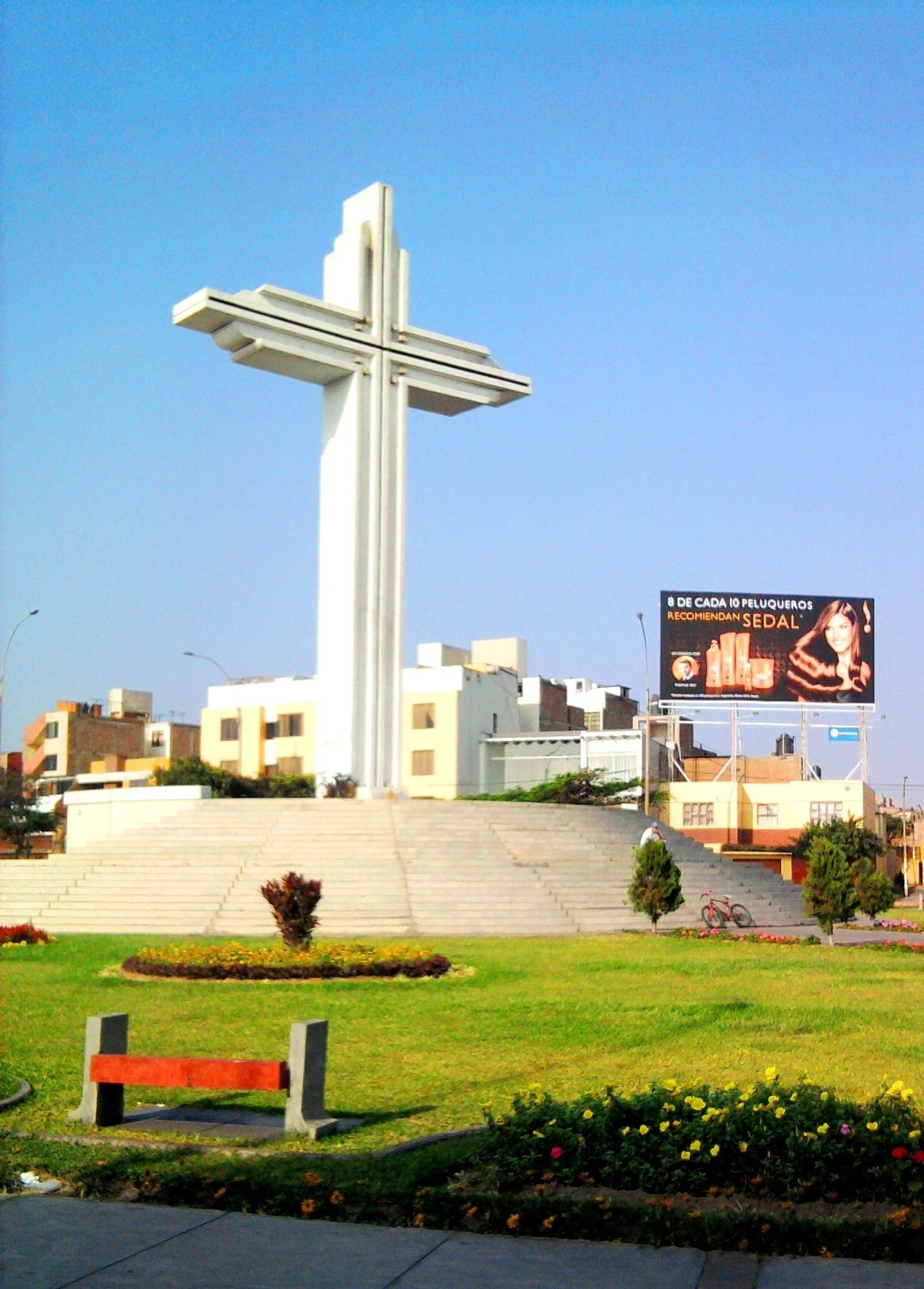 Cruz del ovalo papal en la ciudad de Trujillo Perú .